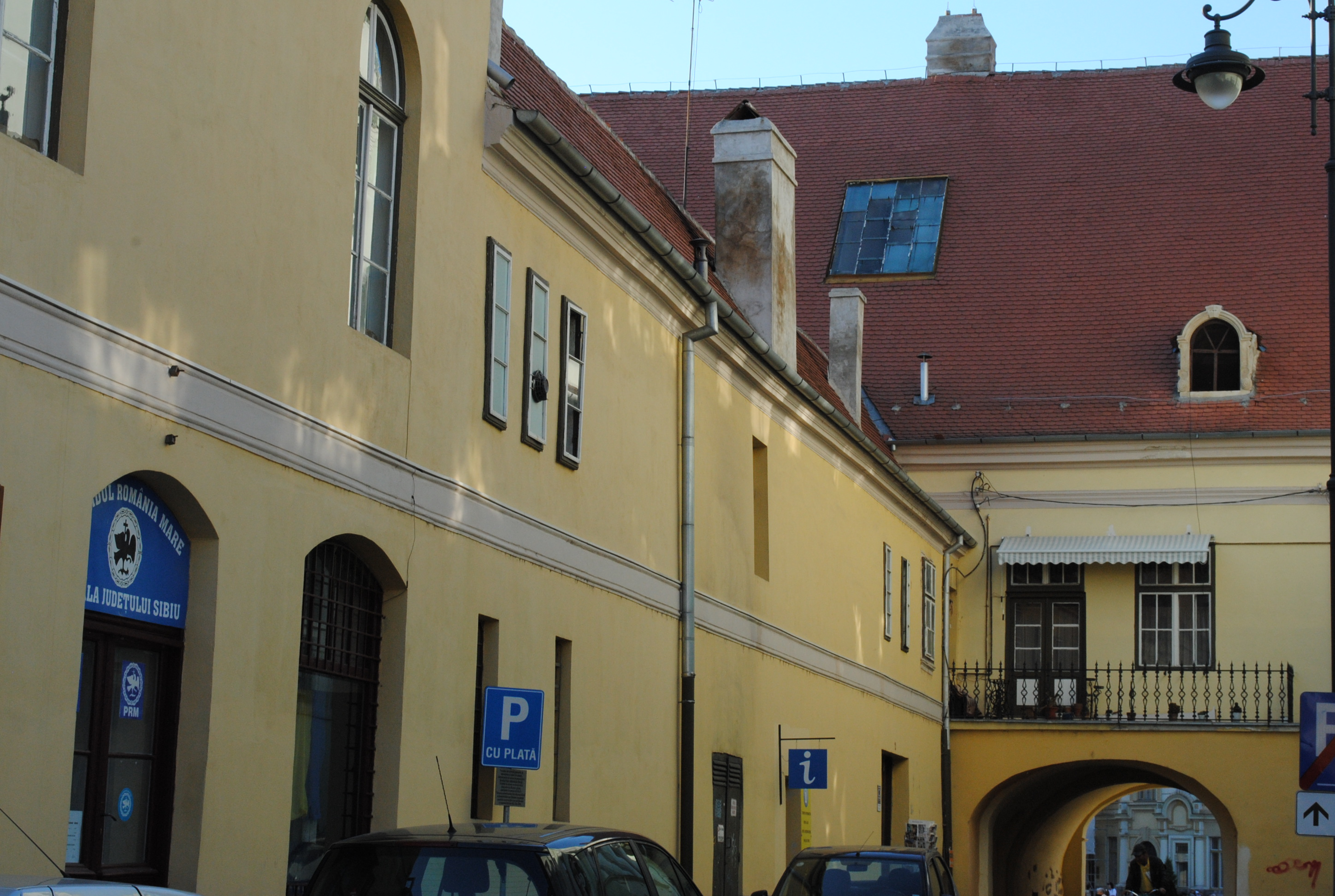 Casă, 1450 - 1475, sec. XVII, 1750 - 1850